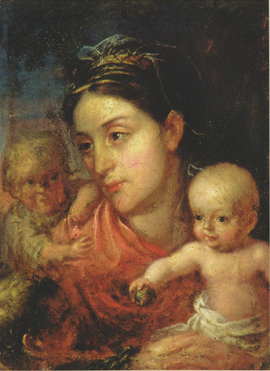 Партрэт жонкі мастака з дзецьмі